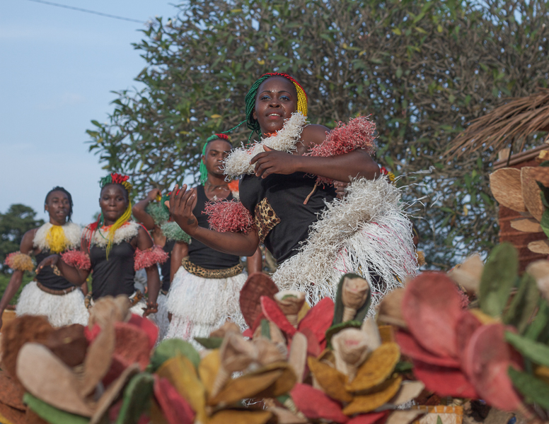 Une danseuse de Bikutsi en plein envol.